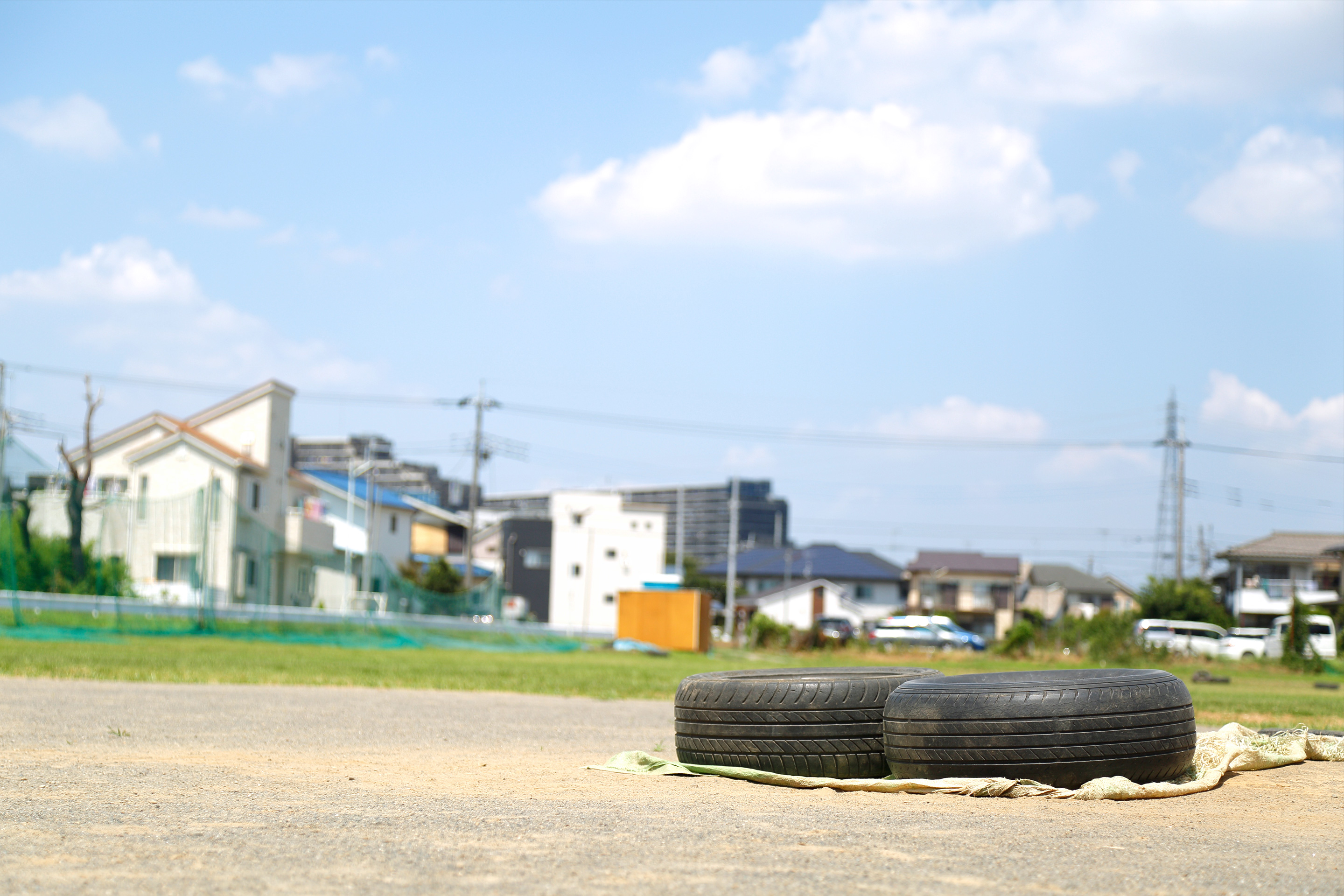 廃ja:タイヤの置かれている公園。大字日野にて。